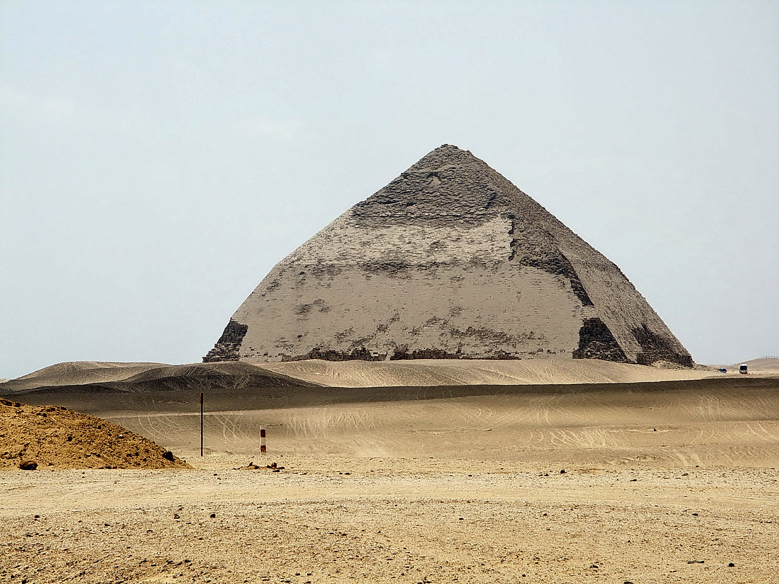 Bent Pyramid 曲折金字塔